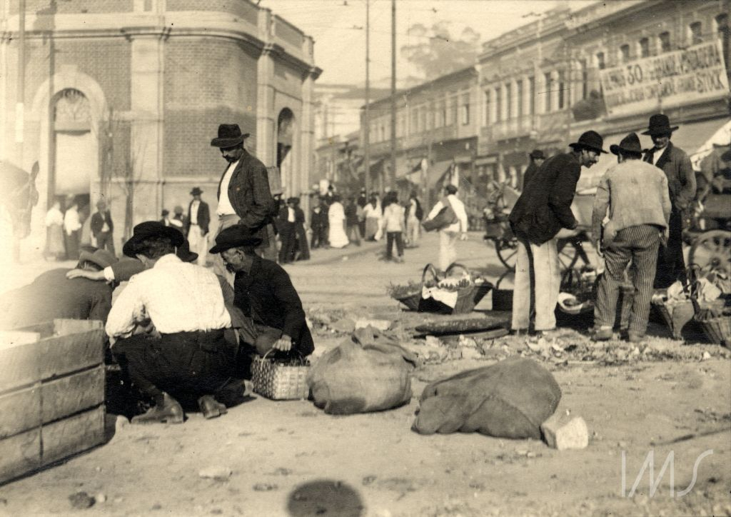 Esquina da rua 25 de Março com General Carneiro